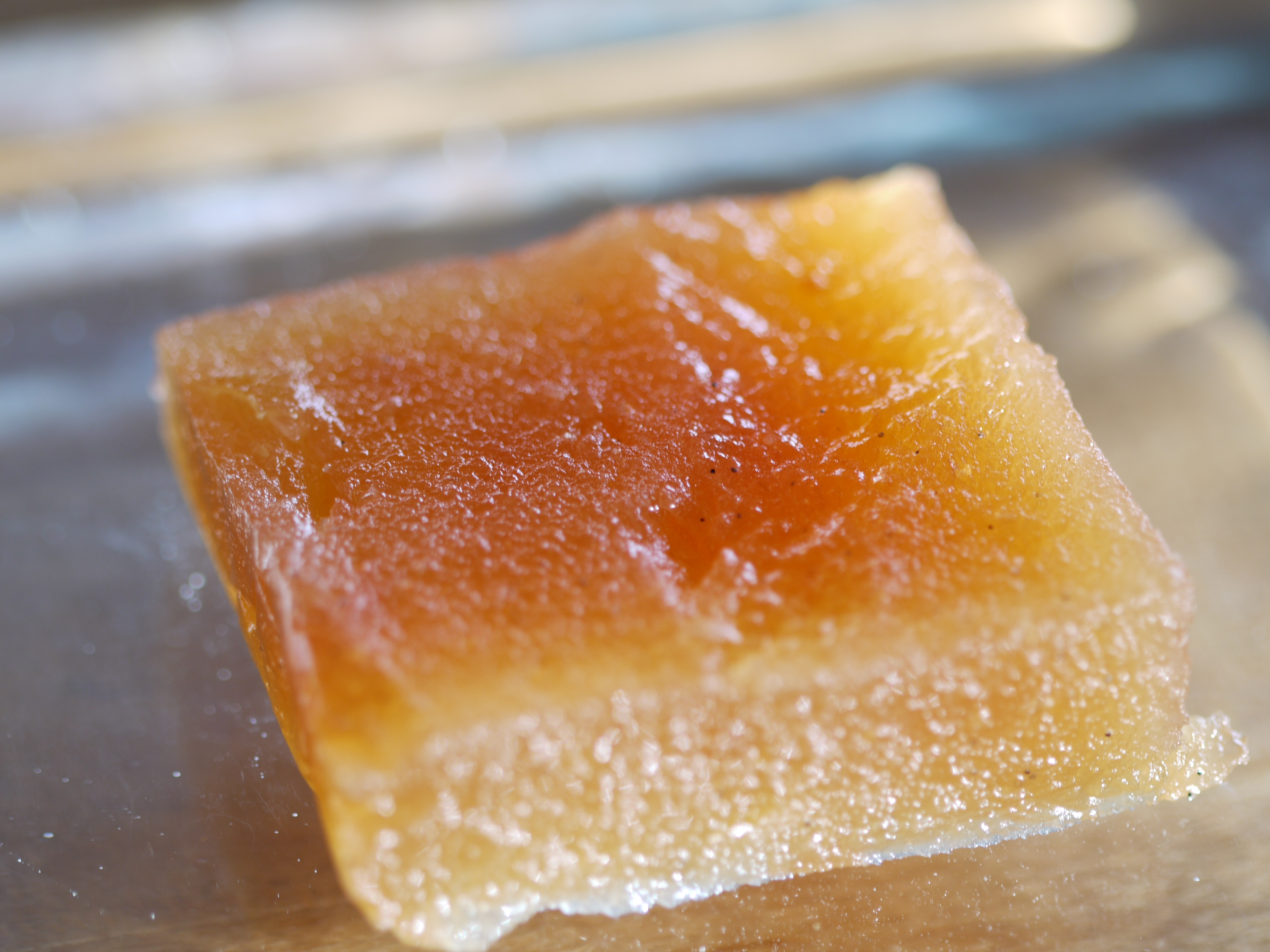 Membrillo